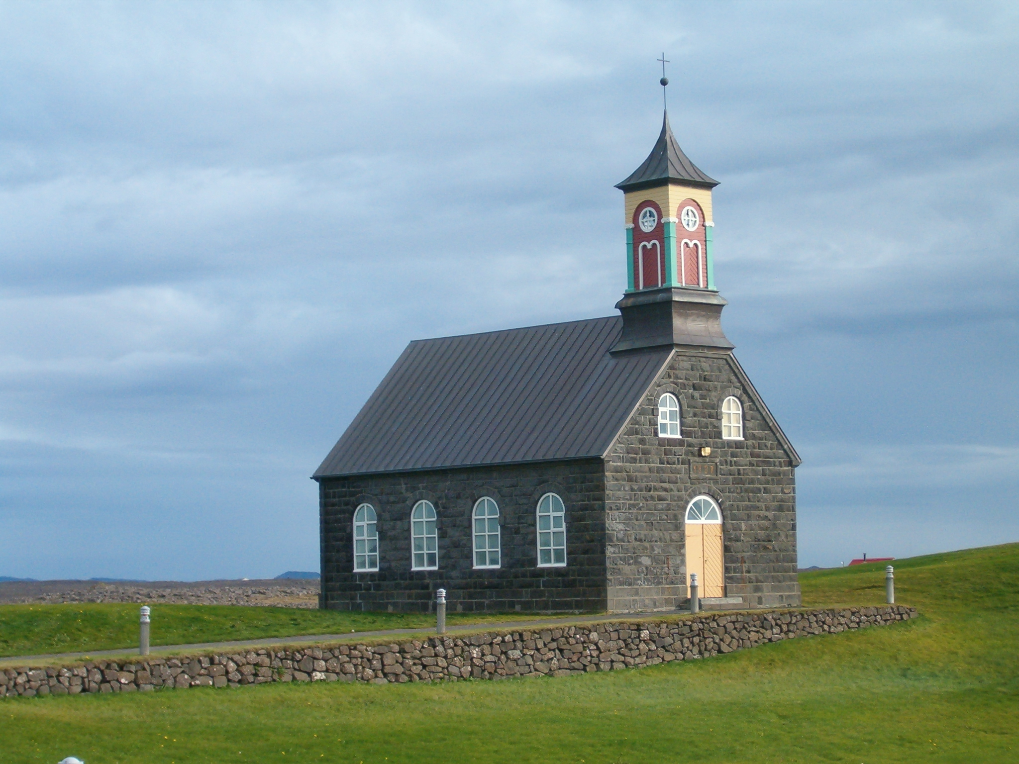 Kirke ved Sandgerði. Hvalsneskirkja.